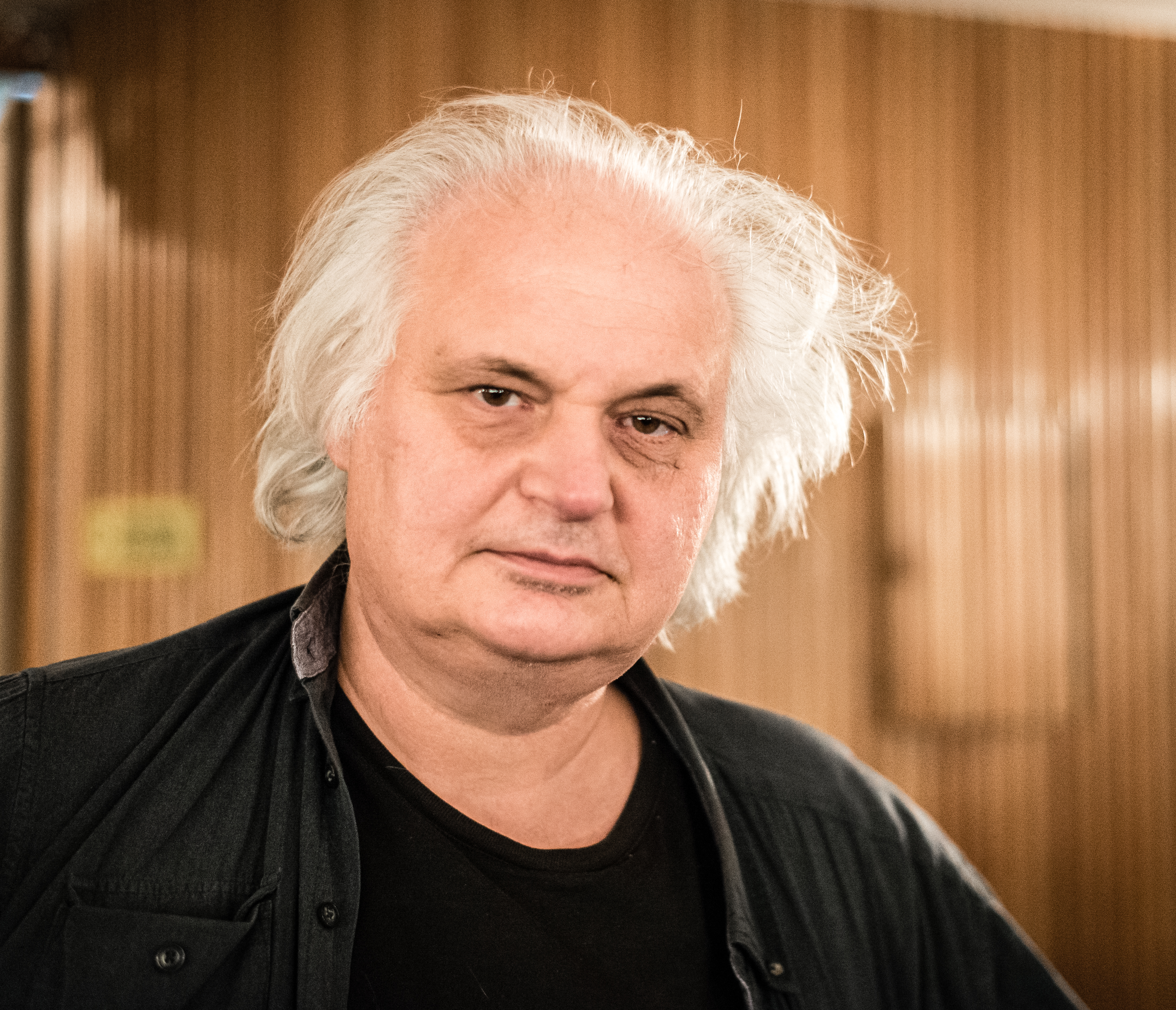 Göran Greider i ett samtal om filmen och personen Joe Hill på Folkets Bio i Stockholm den 19 november 2015.